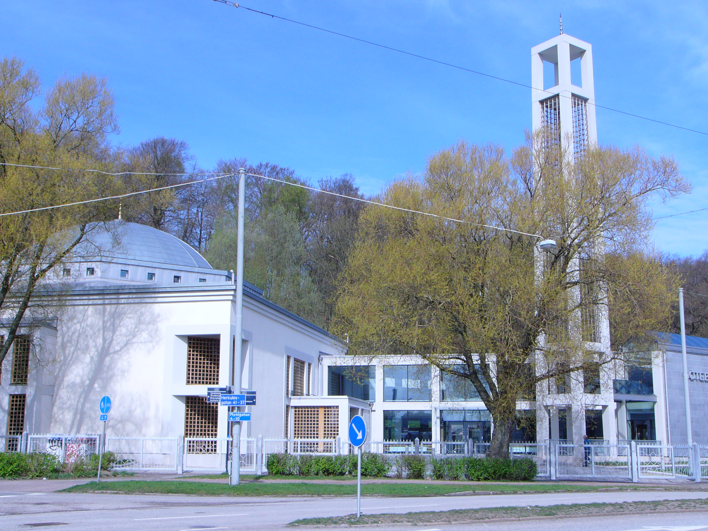 Göteborgs moské